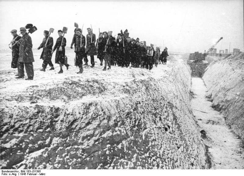 Berlin, Anmarsch zum Stellungsbau ADN-ZB/Archiv Das faschistische Deutschland im II. Weltkrieg 1939-45 Berlin wird am 1. Februar 1945 zum "Verteidigungsbereich" erklärt. Die Bevölkerung wird zum Bau von Straßensperrungen u.ä. befohlen. Betriebsangehörige, fast nur Frauen, im Schneetreiben auf dem Anmarsch zum Ausheben von Panzergräben am Stadtrand. Aufnahme Februar/März 1945 343-45